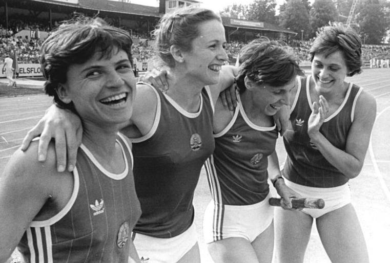 Dagmar Rübsam, Gesine Walther, Marita Koch, Sabine Busch ADN-ZB Kluge 3.6.84 Erfurt: 35. DDR-Meisterschaften in der Leichtathletik- Weltrekord- Am Schlußtag der Meisterschaften stellte die 4x 400-m-Staffel der Frauen-Nationalmannschaft in der Besetzung Dagmar Rübsam, Gesine Walther, Marita Koch und Sabine Busch (vlnr) mit 3:15,92 einen neuen Weltrekord auf.